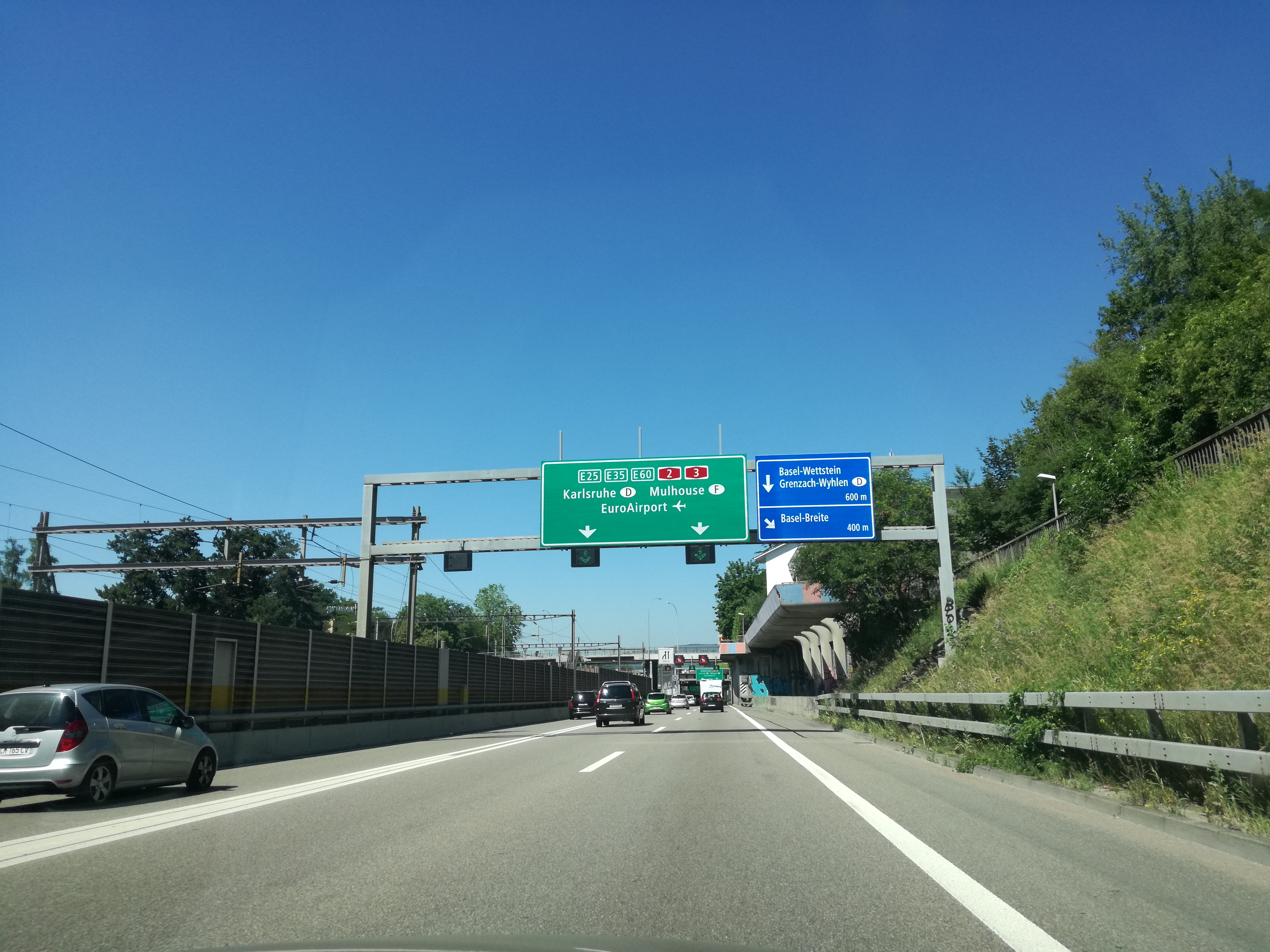 Motorväg A2/A3 i Basel